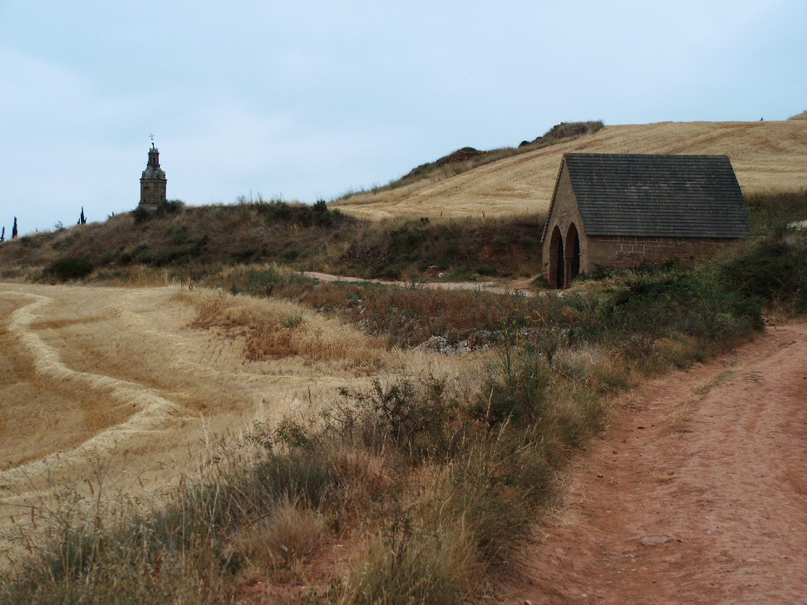 monjardin_fuente de moros